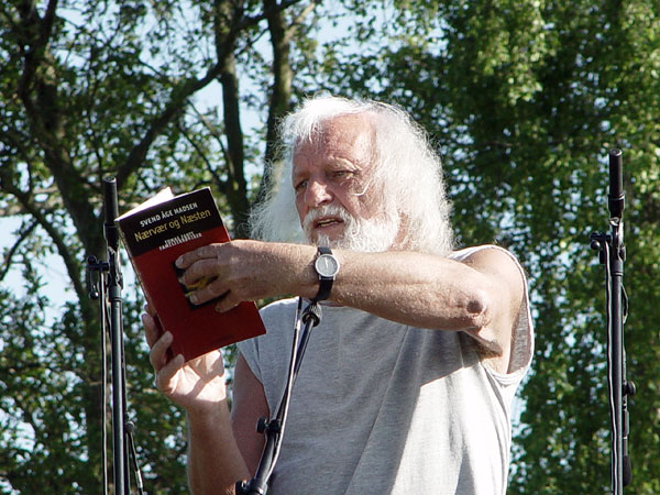 Sven Aage Madsen læser op i Brabrand (Aarhus 2010)